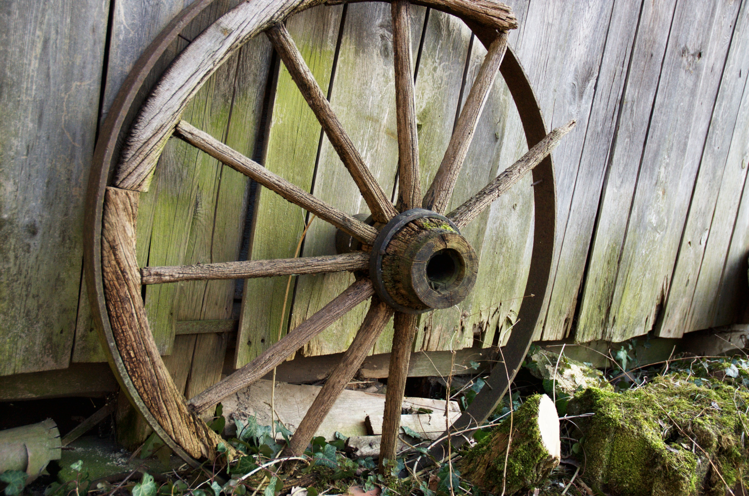 Altes Holzrad (Bechhofen bei Windsbach)